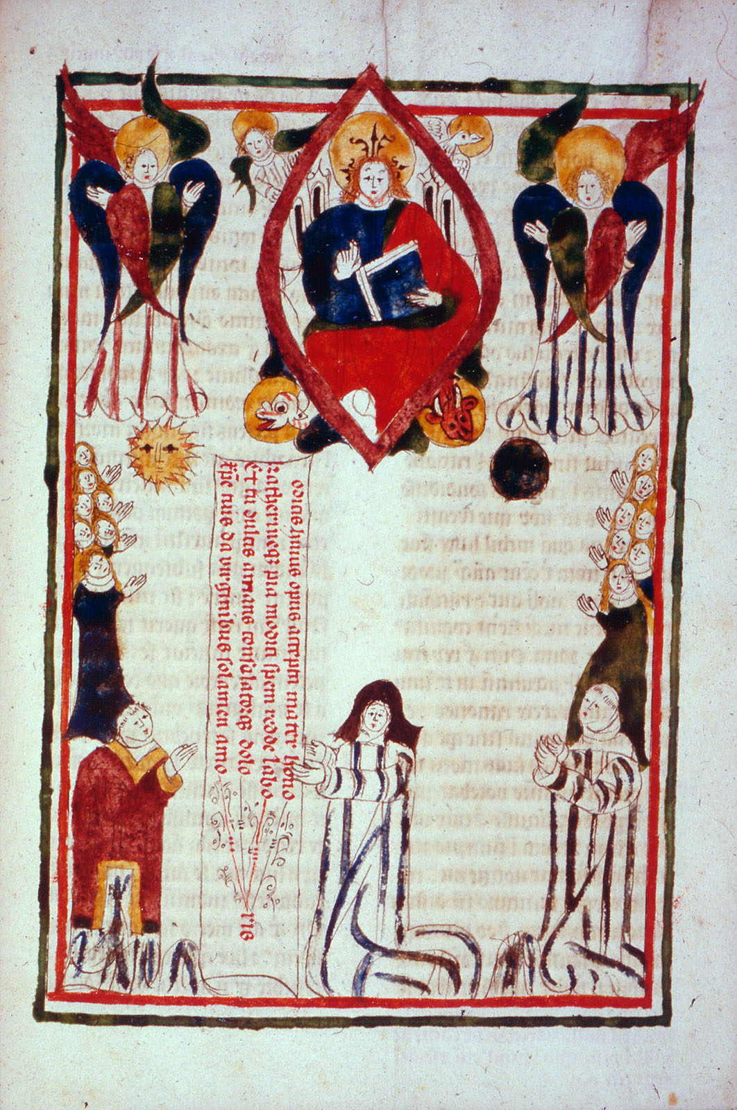 Speculum virginum aus Birgittanerkloster